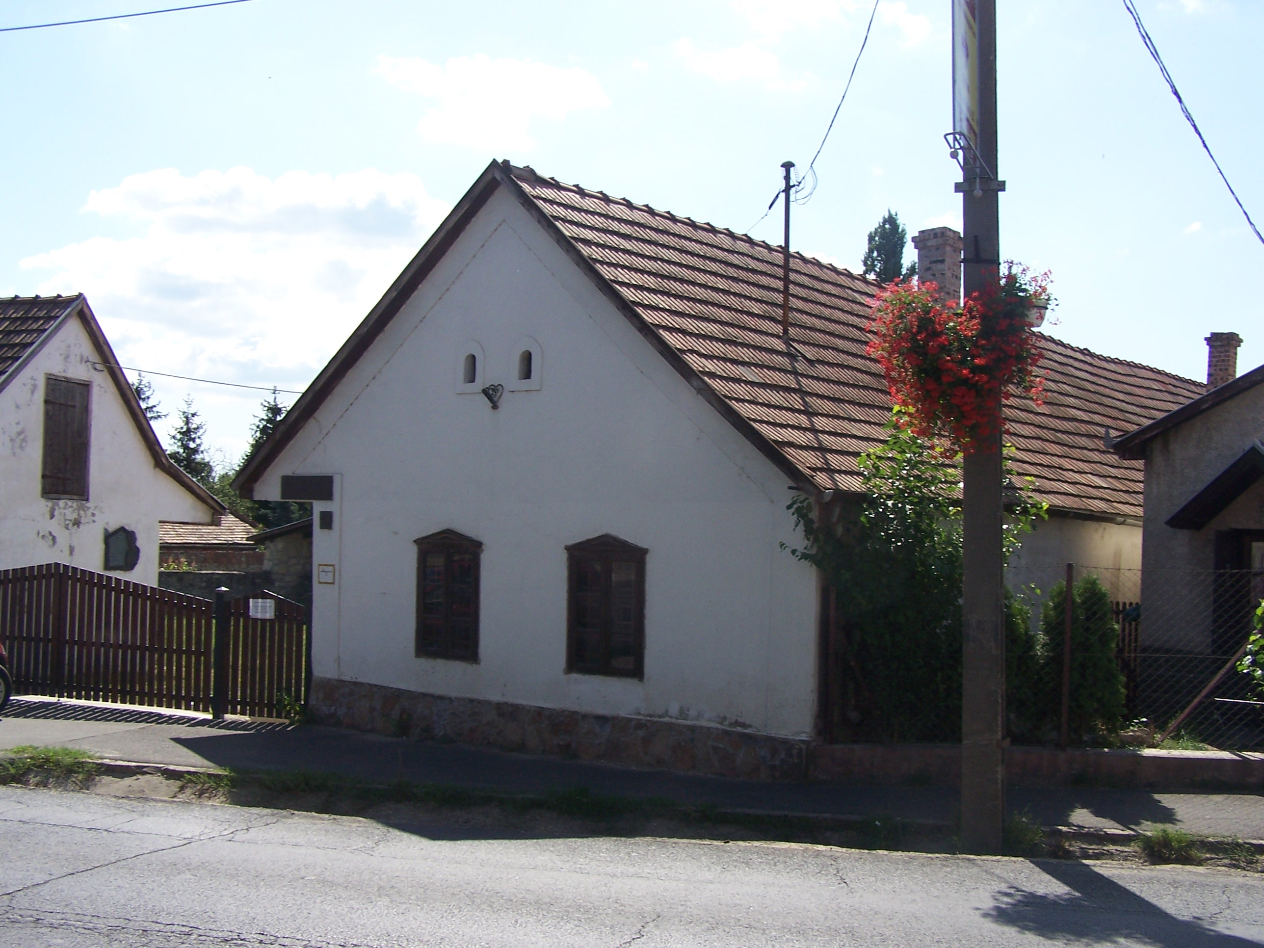 Szerb porta, néprajzi gyűjtemény (Pomáz, Kossuth Lajos utca 48.)